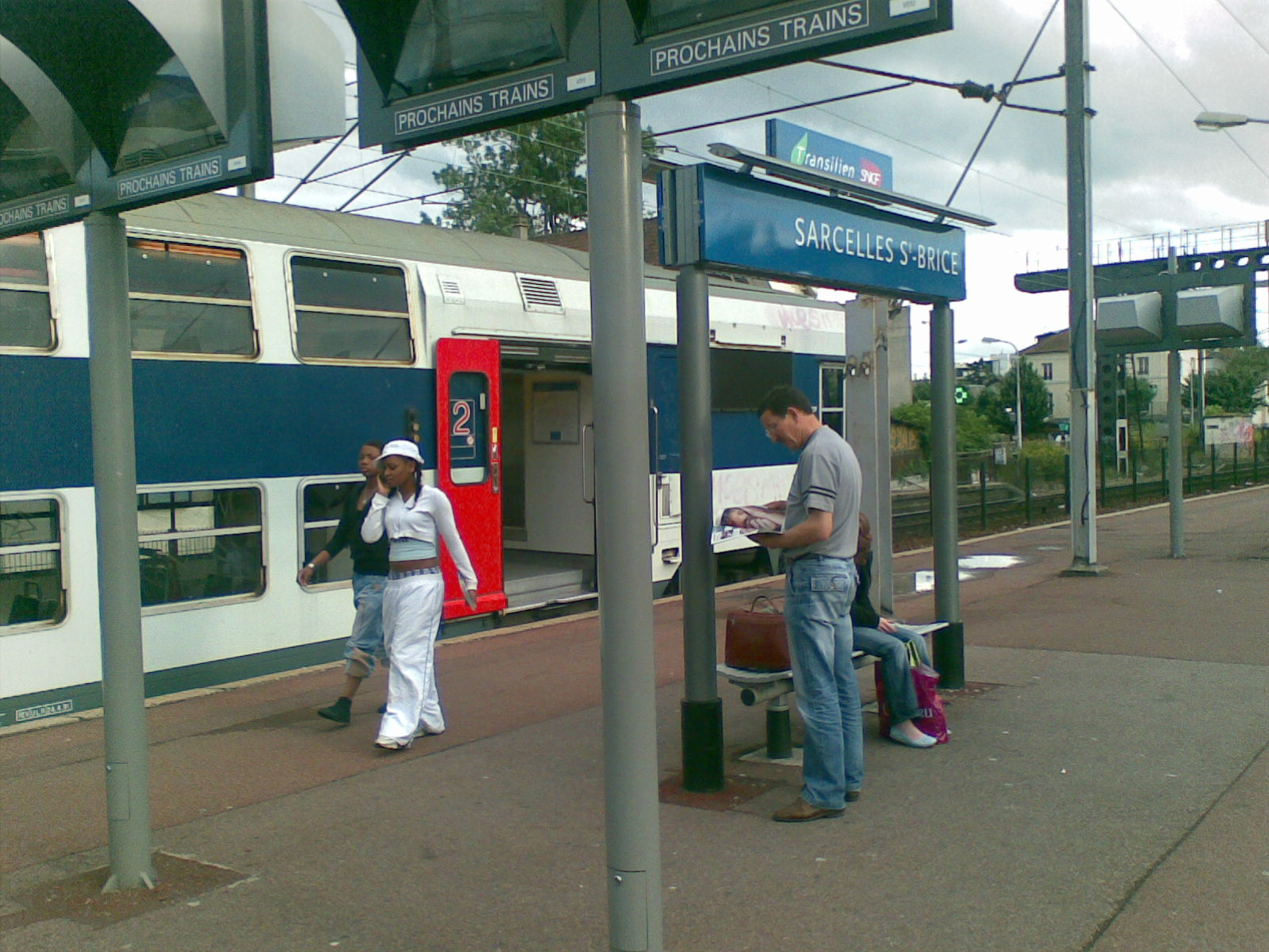 photo de la gare